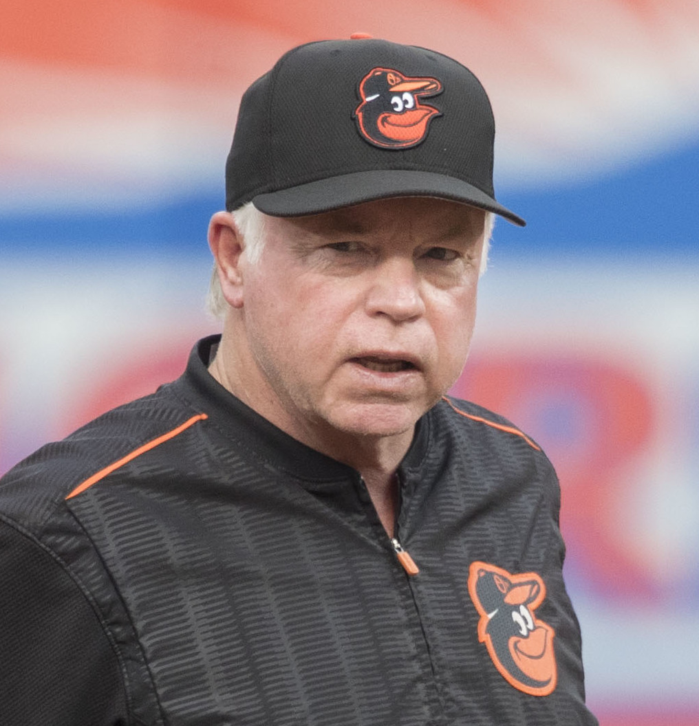 Yankees at Orioles 9/5/17